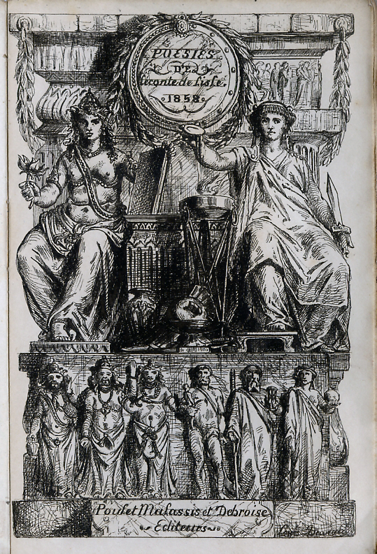 Grabado del pintor francés Louis Duveau para Poesias completas de Leconte de Lisle editado en 1858